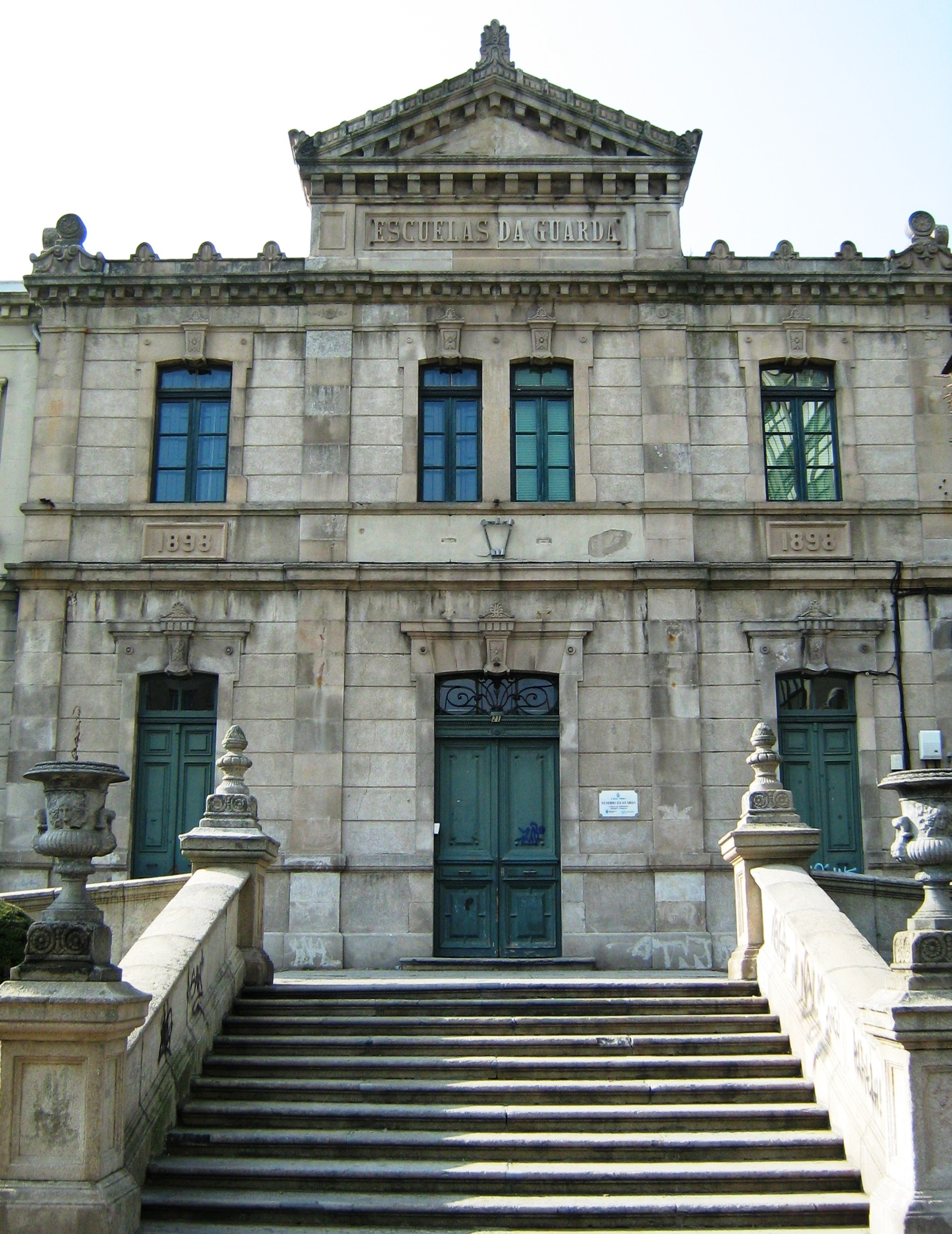 Escolas da Guarda, de Faustino Domínguez Coumes-Gay (A Coruña)